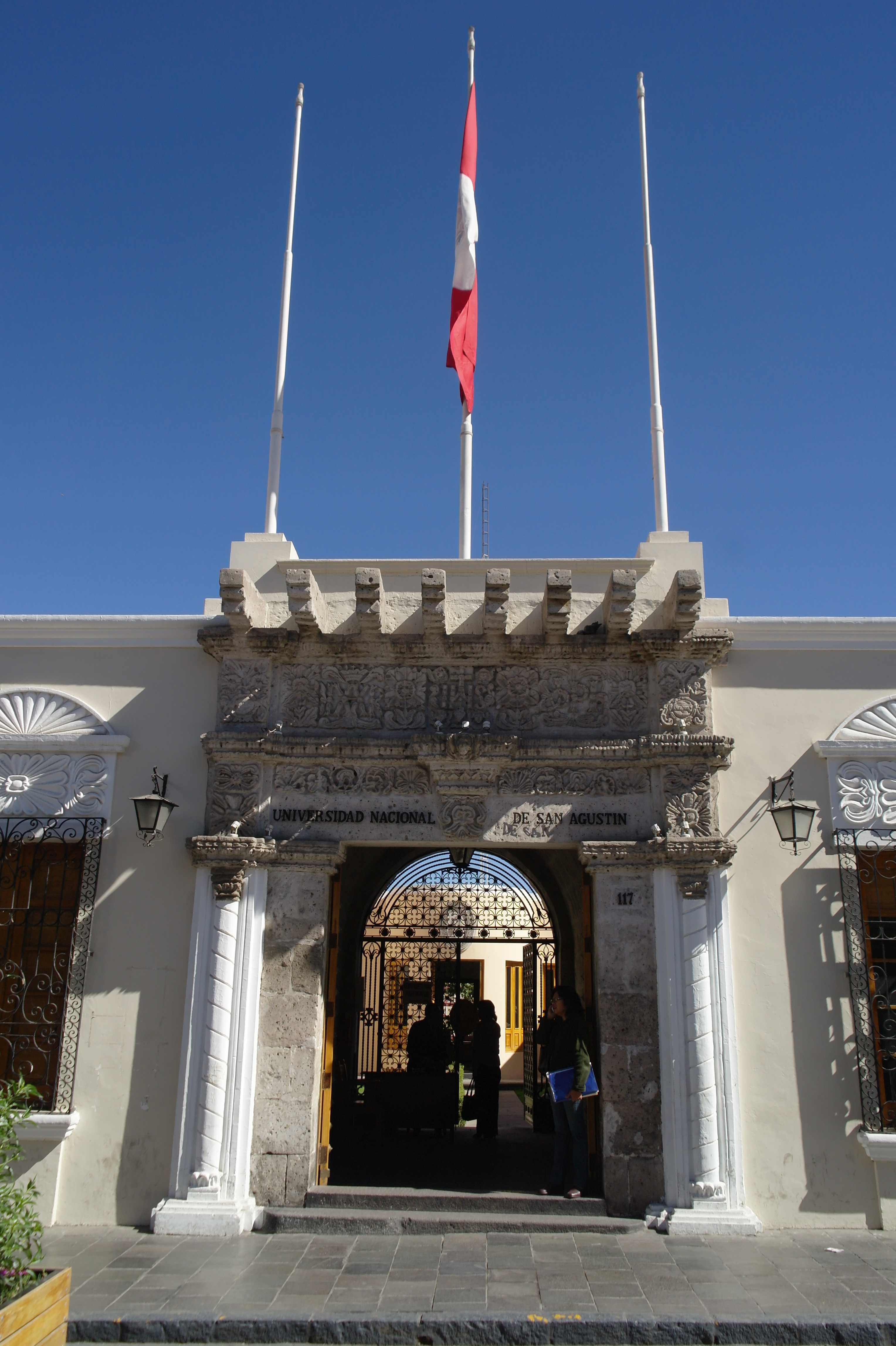 Casa de la Universidad San Agustín